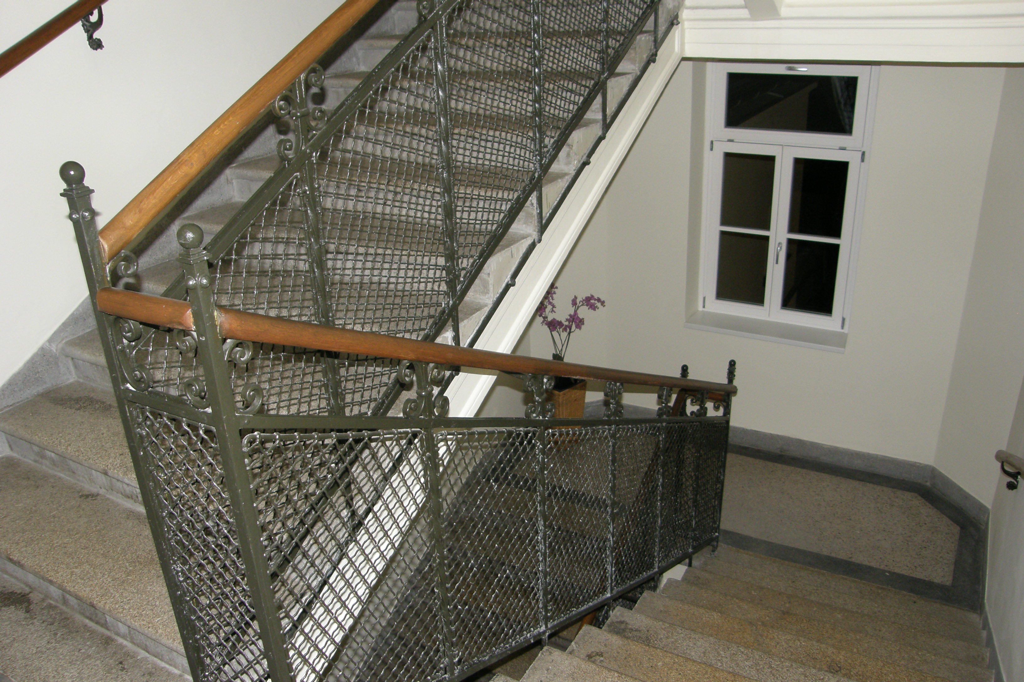 Das Stiegenhaus im ehemaligen Männerheim